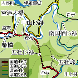 五社峠概要地図